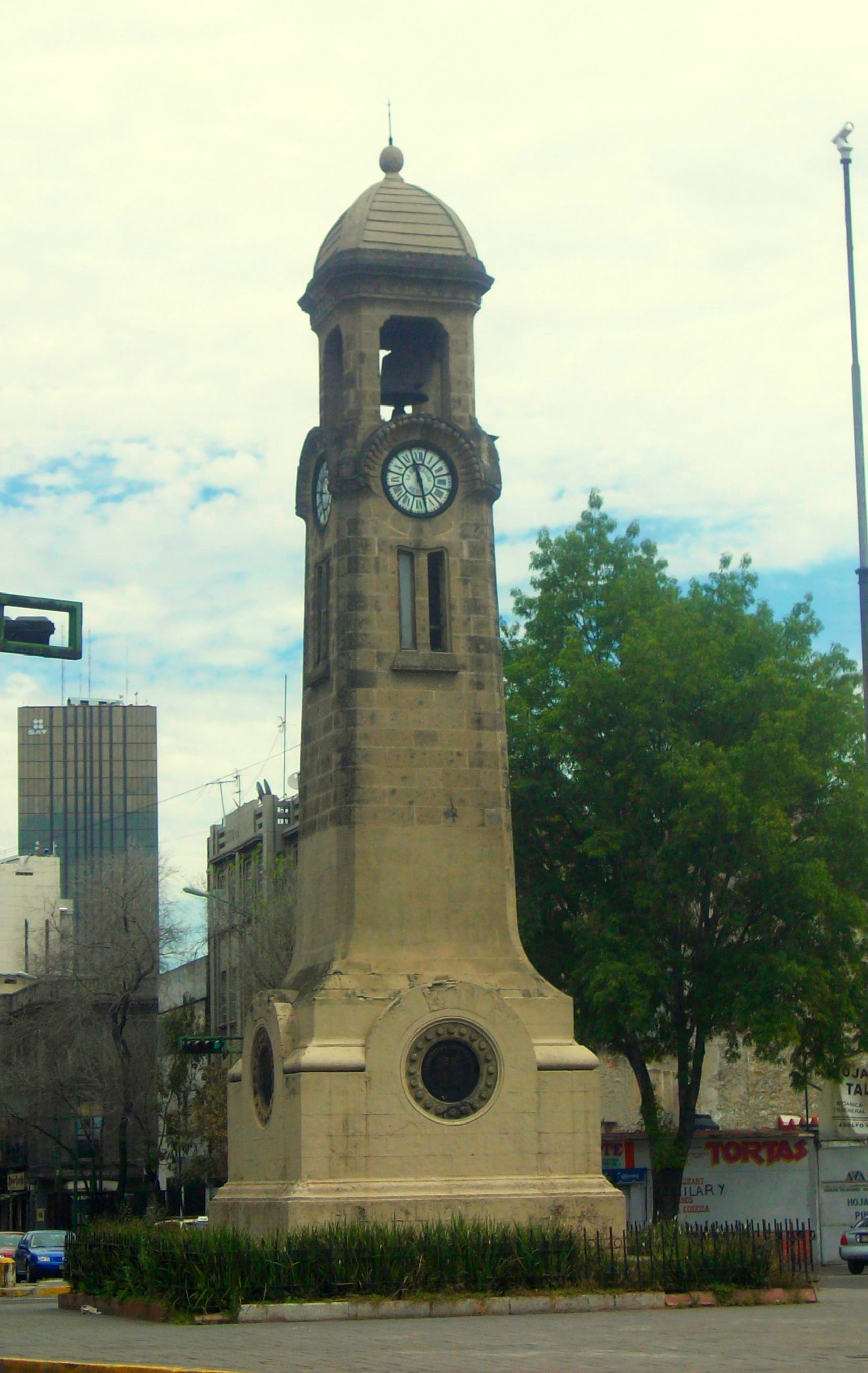 Foto del denominado Reloj Chino que se encuentra en avenida Bucareli